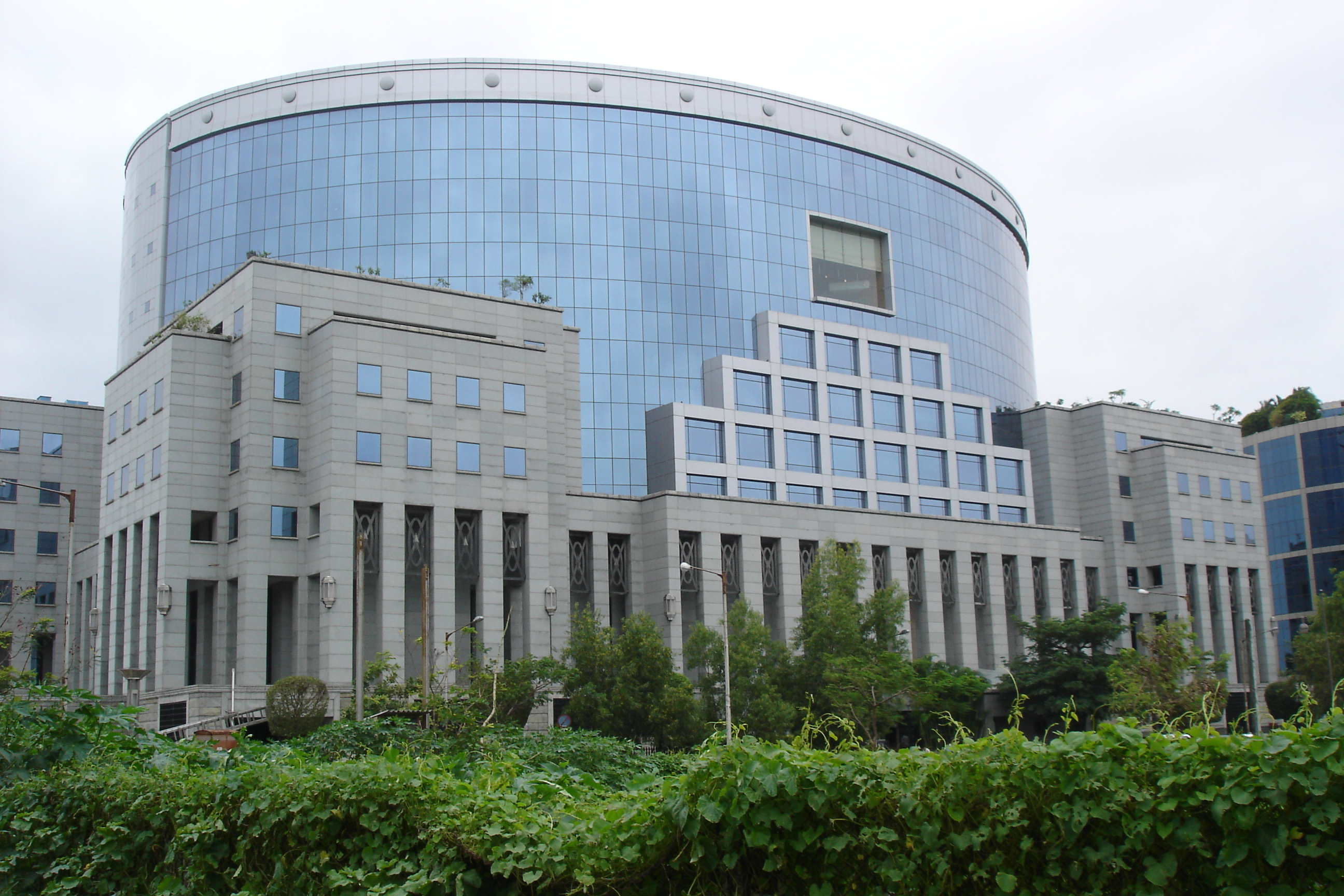 Bandra-Kurla Complex in Bombay